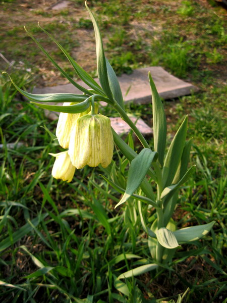 Fritillaria pallidiflora - Рябчик бледноцветковый в культуре (Красноярский край, пос. Танзыбей). Автор: Николай Степанов. 15.05.2008